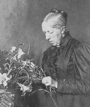 Foto van Gerardine van de Sande Bakhuyzen